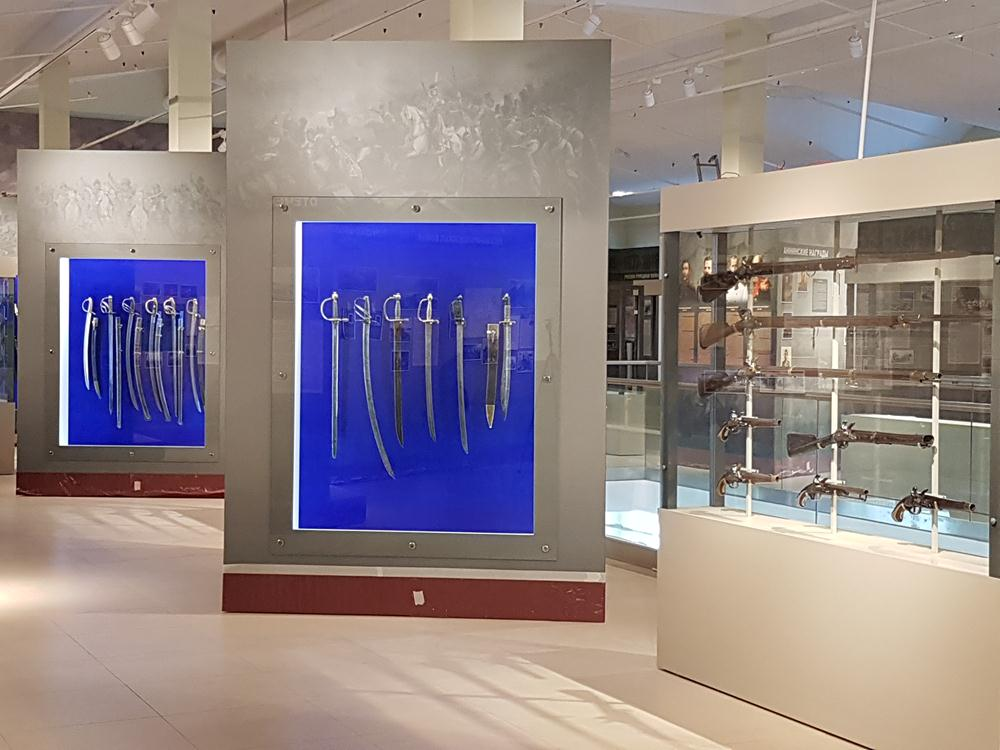 Коллекция холодного оружия XIX в. в Музее отечественной военной истории